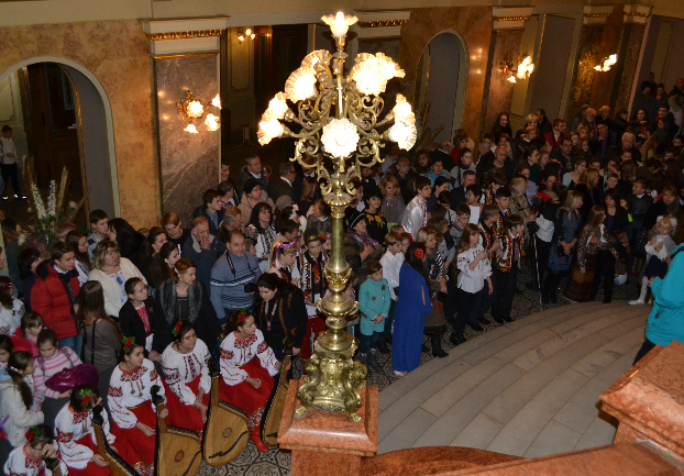 Фестиваль "Сурми Звитяги", нагородження переможців в оперному театрі міста Львова, Україна